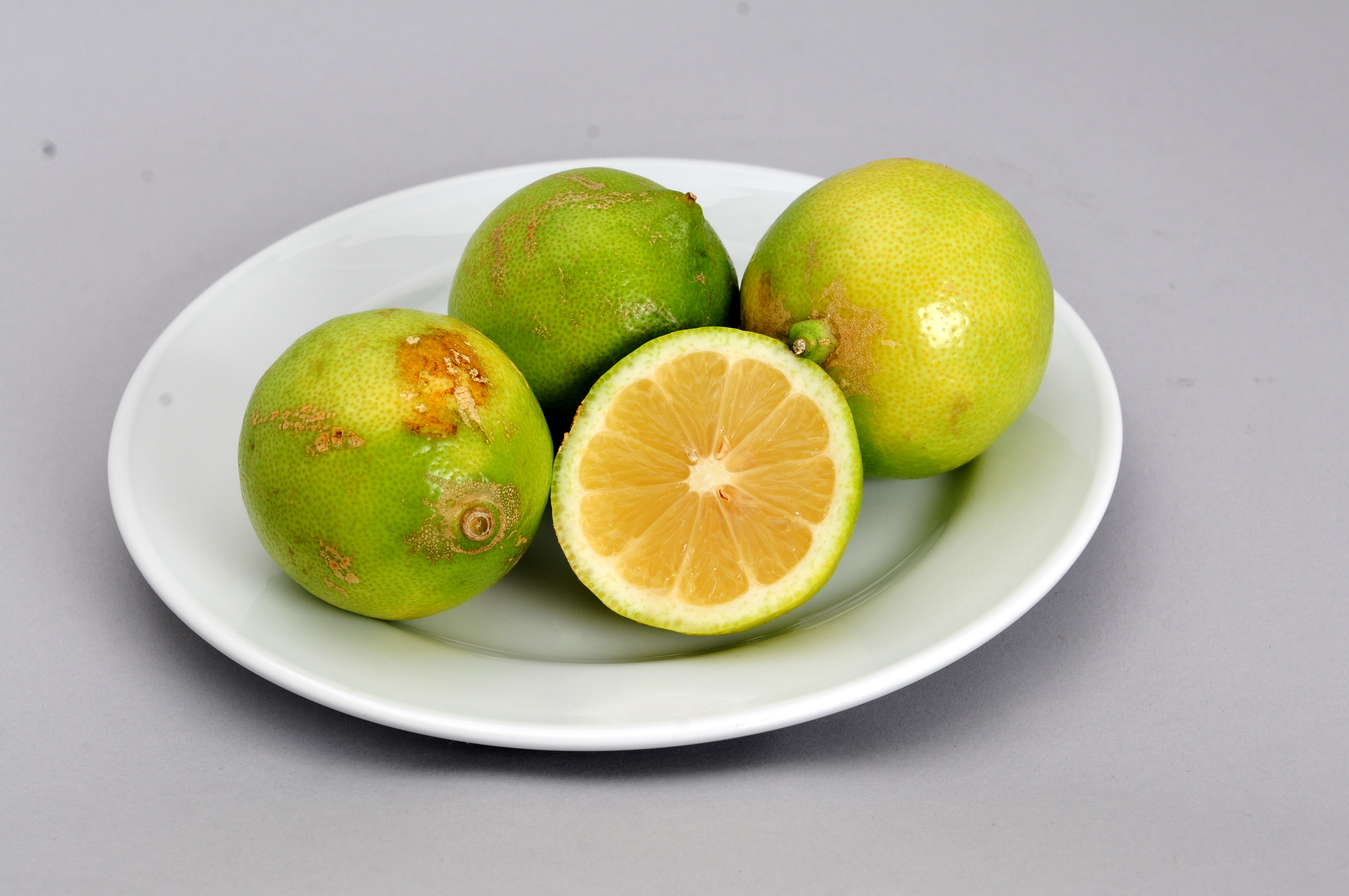 Treffen der Redaktion Essen und Trinken ion Wien